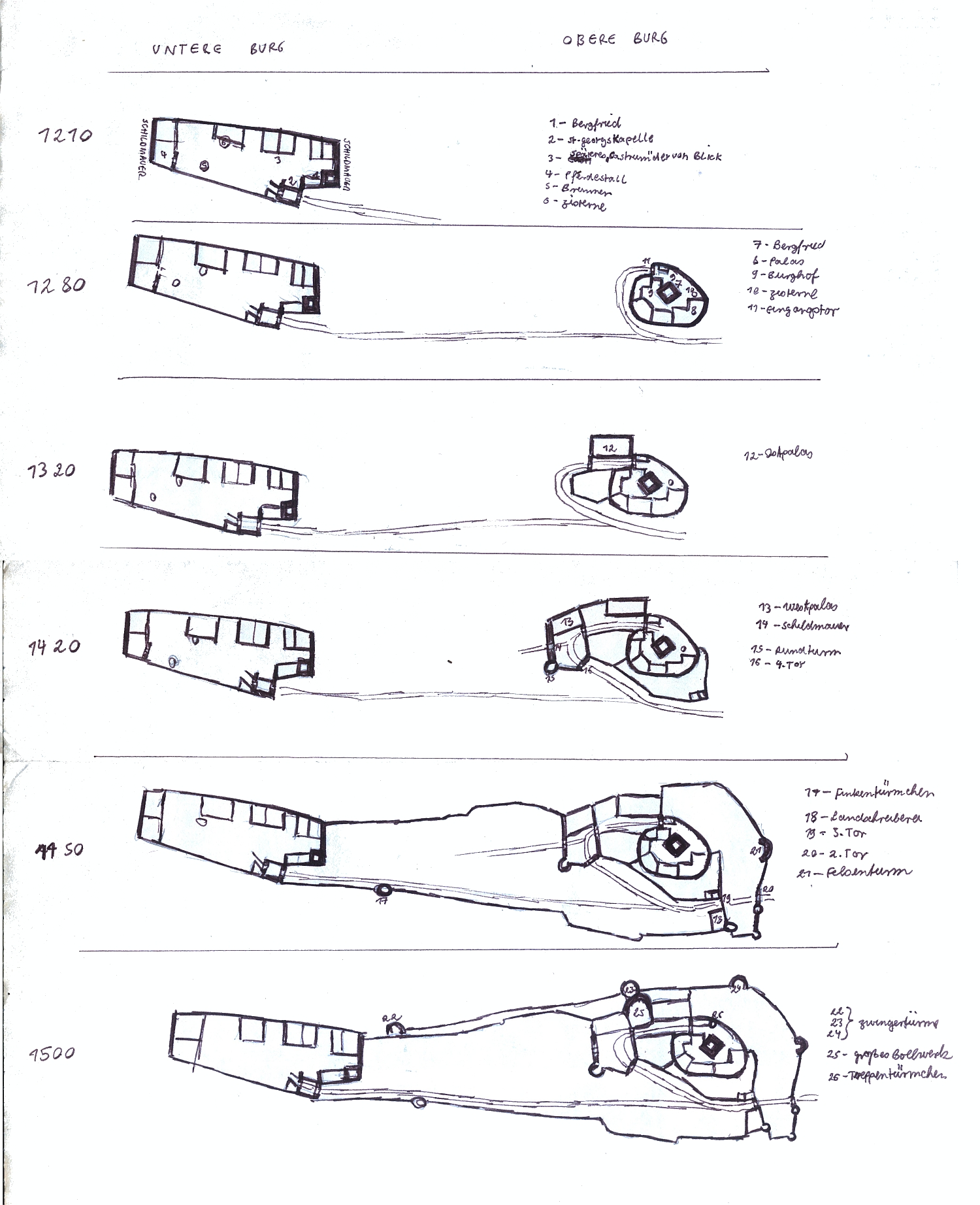 Burg Lichtenberg bei Kusel, Entwicklung der Burg bis 1500